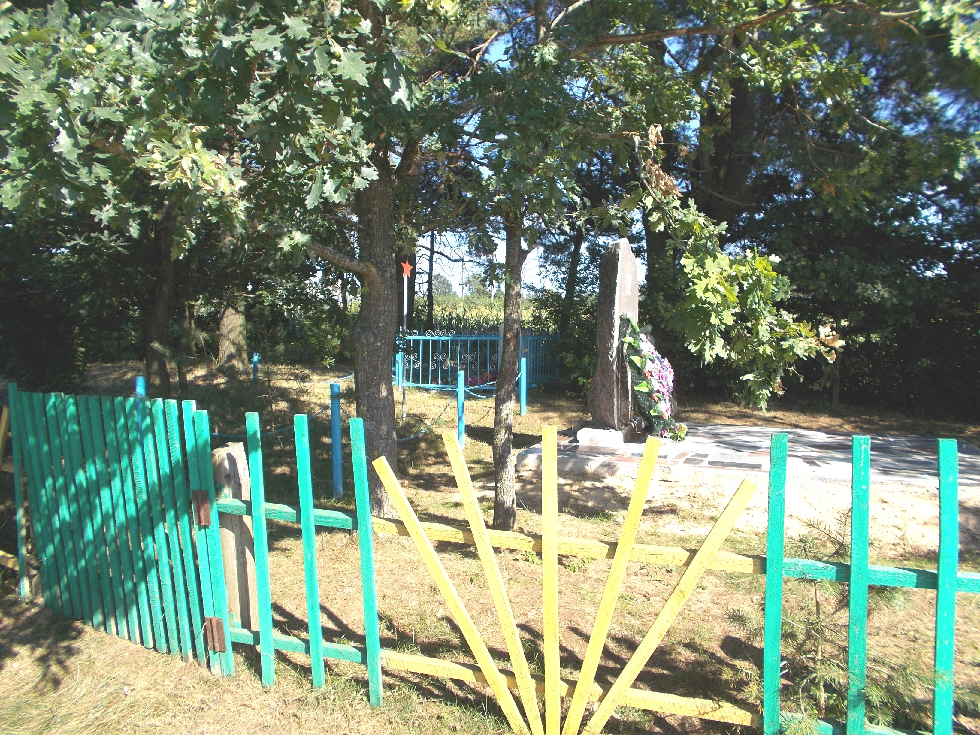 Часть мемориального комплекса у памятника на месте убийства 130 евреев - узников Волынецкого гетто (Верхнедвинский район).